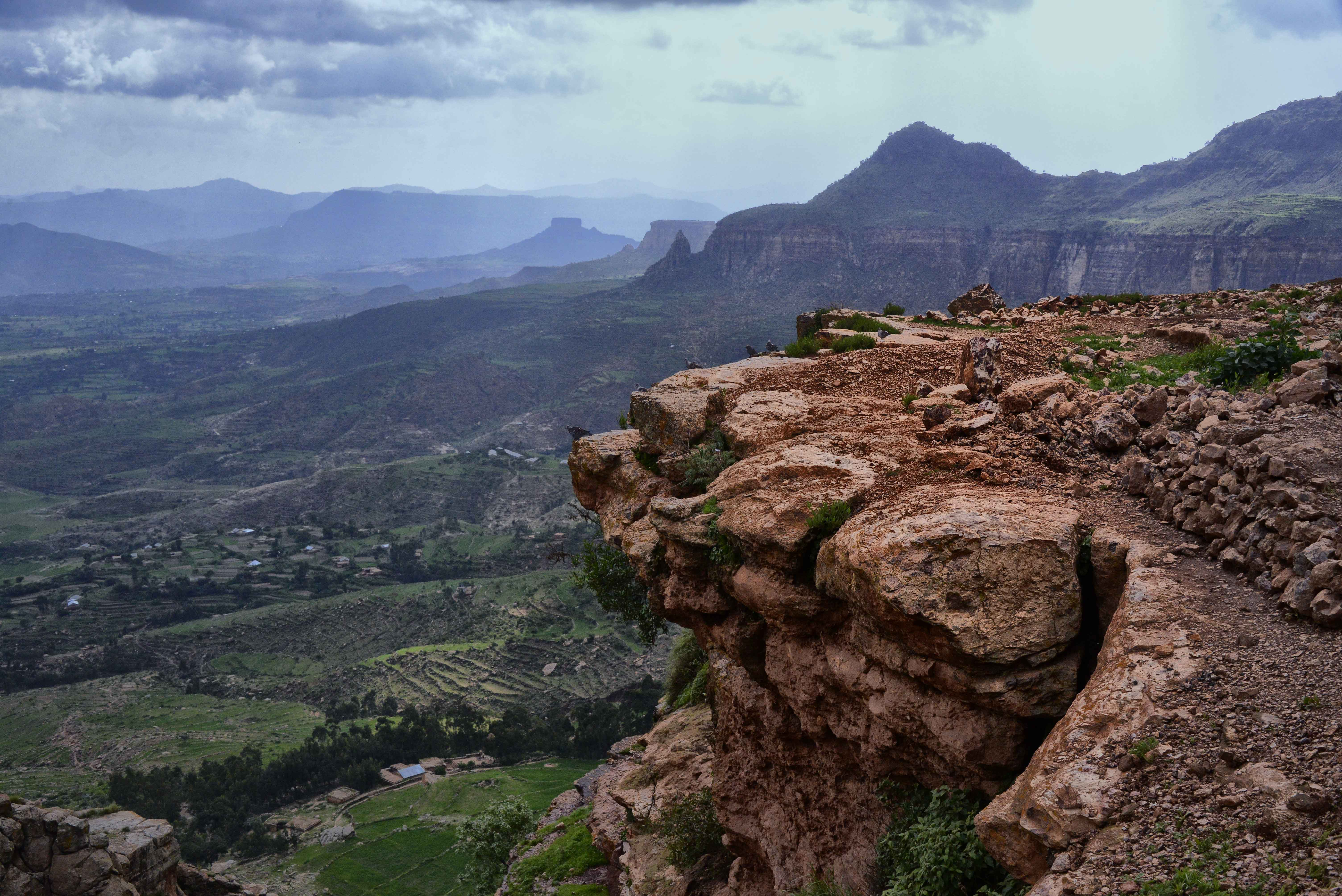 Tigray Escarpment, Ethiopia